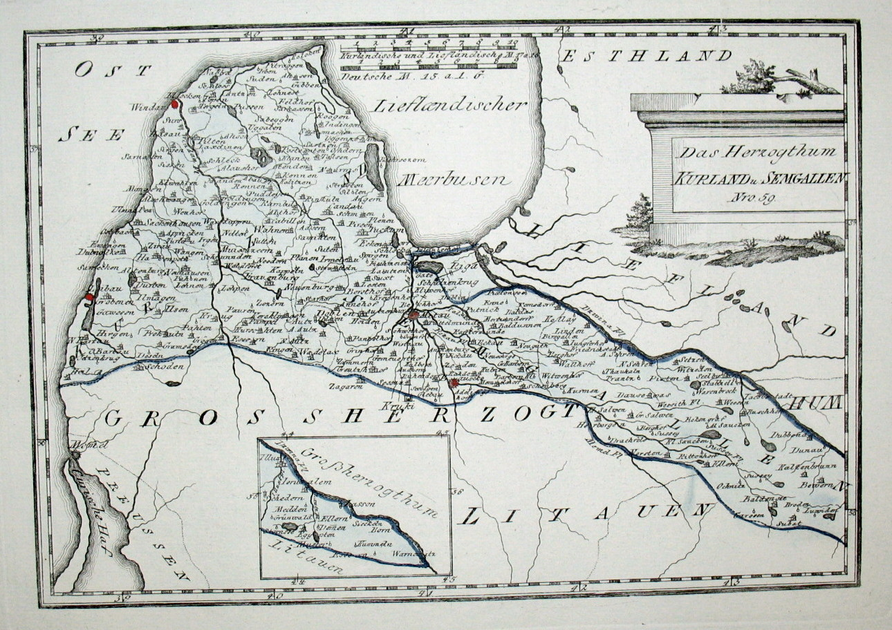 Das Herzogthum Kurland u. Semgallen. Nro. 59. Kolorierter Kupferstich